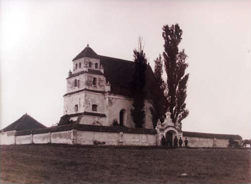 Беларуская (тарашкевіца): Асташын (Astašyn). Кальвінскі збор